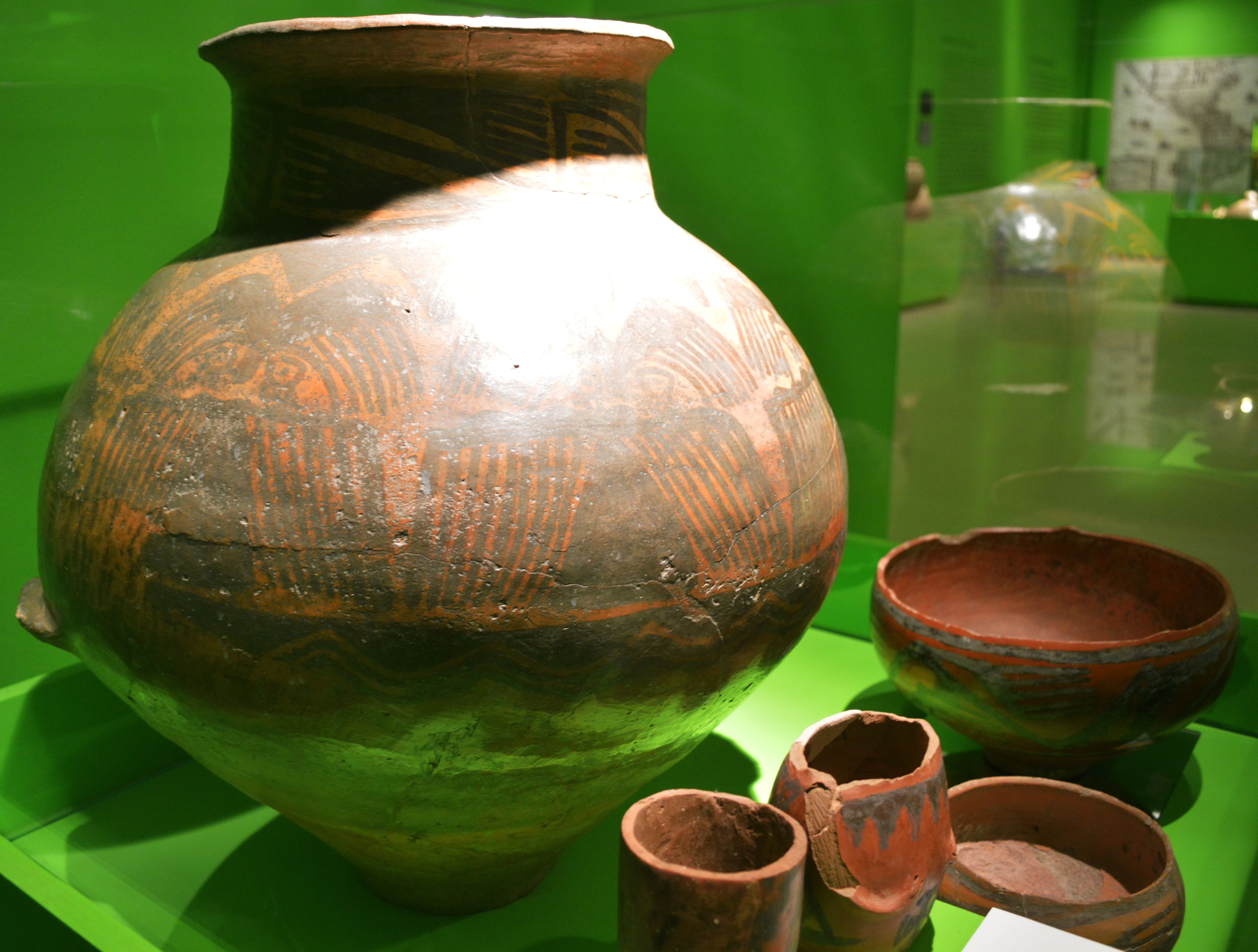 Alfarería indígena.